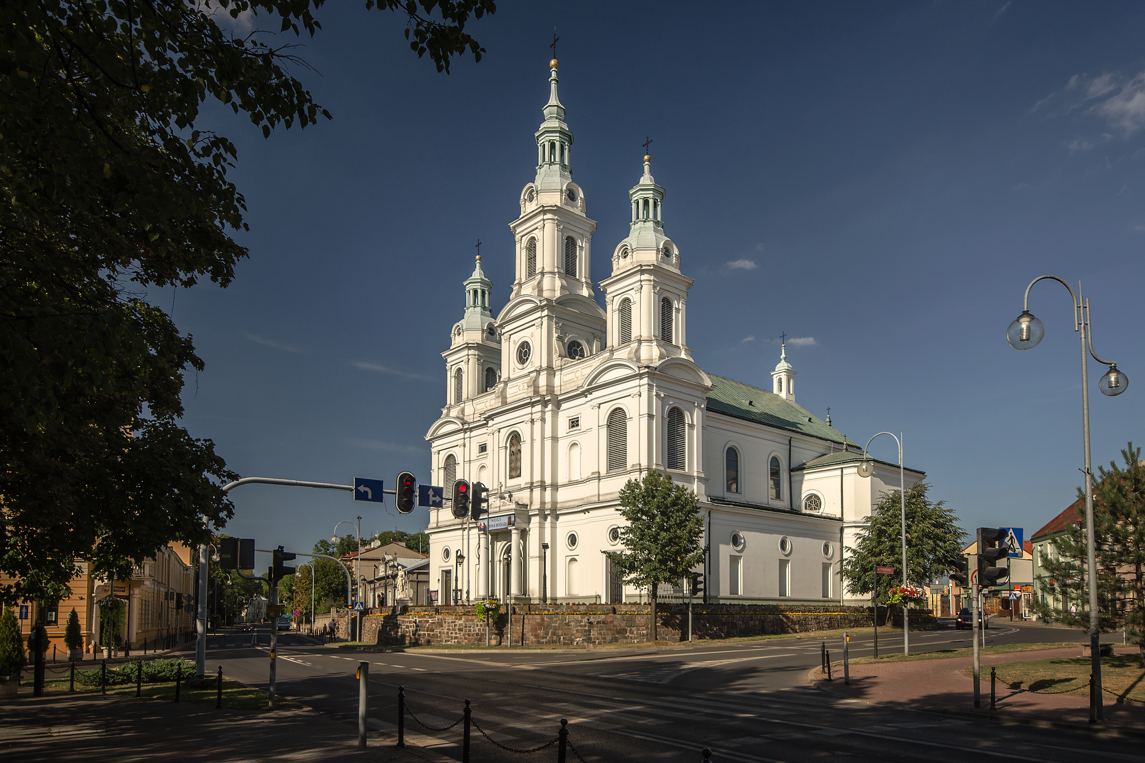 Radomsko, kościół par. p.w. św. Lamberta, 1869-1875